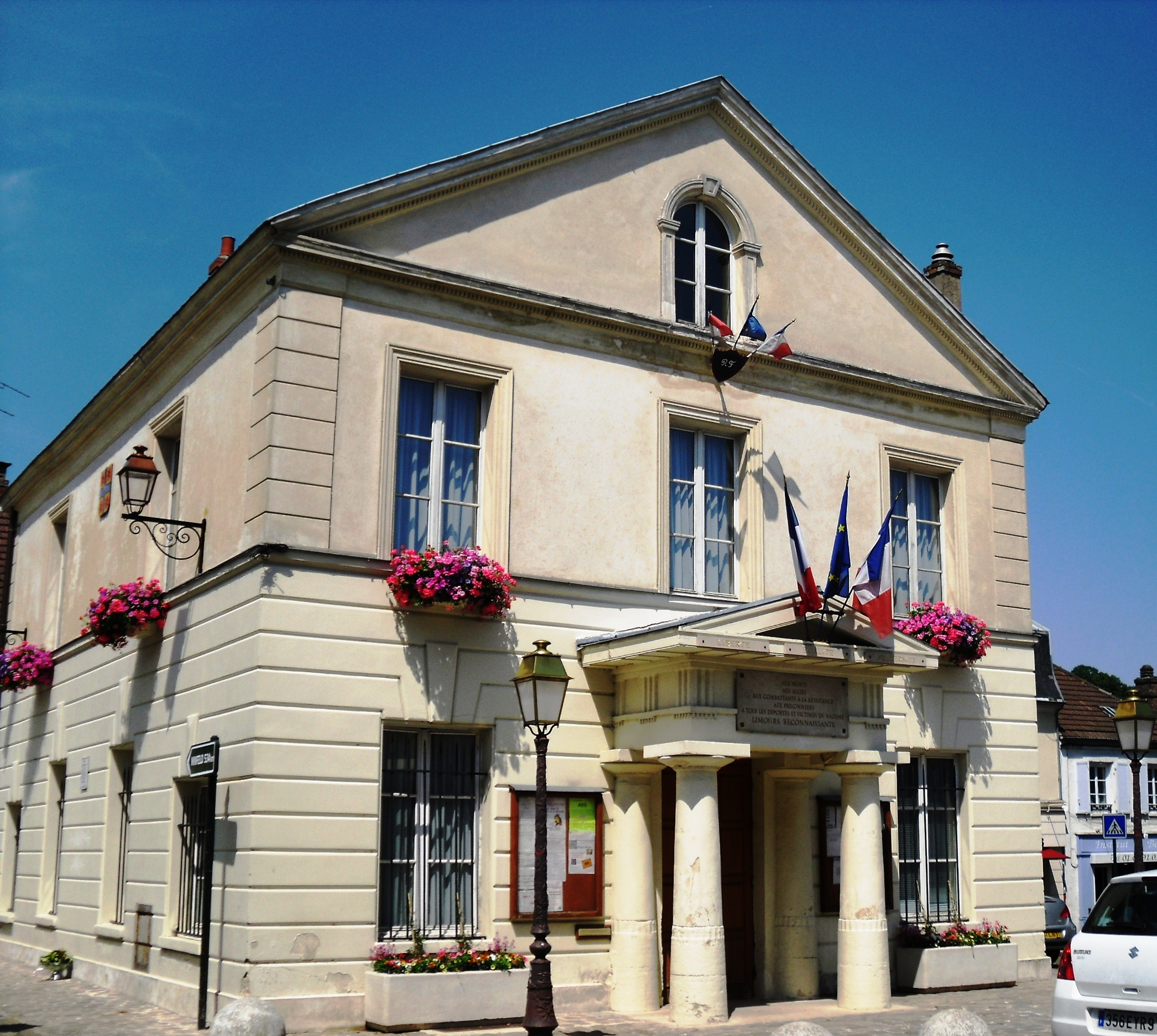 Hôtel de Ville de Limours (91)